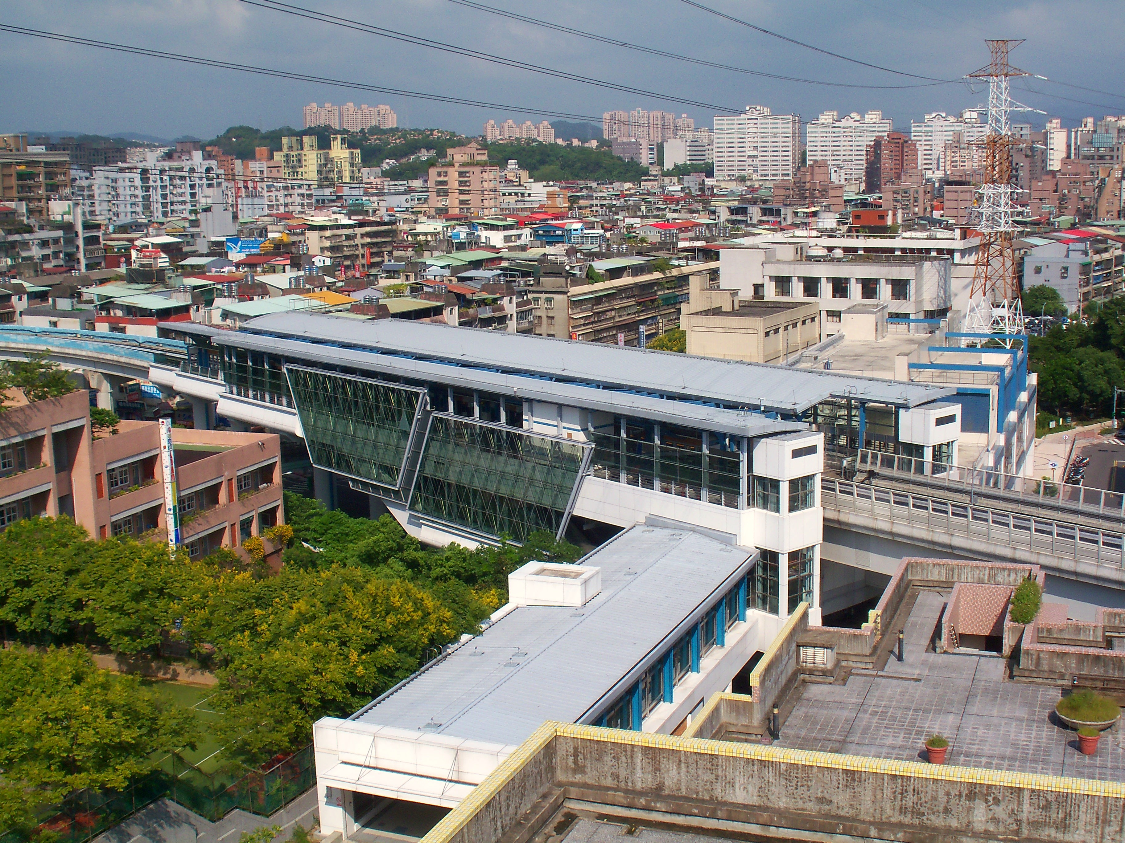 台北捷運内湖線東湖駅。